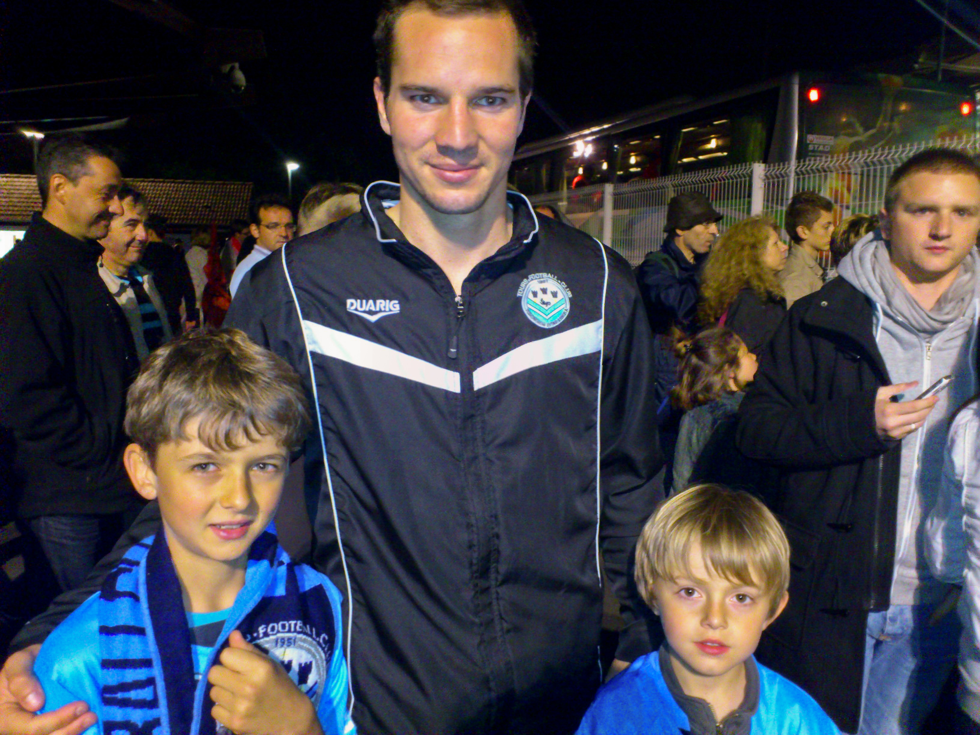 Kevin LEJEUNE (match Tours - Le Mans le 11/05/12)